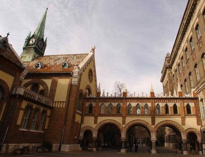 BME, OMIKK